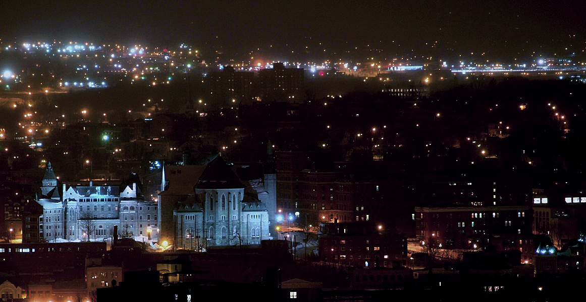 Centre-ville de Sherbrooke, Québec